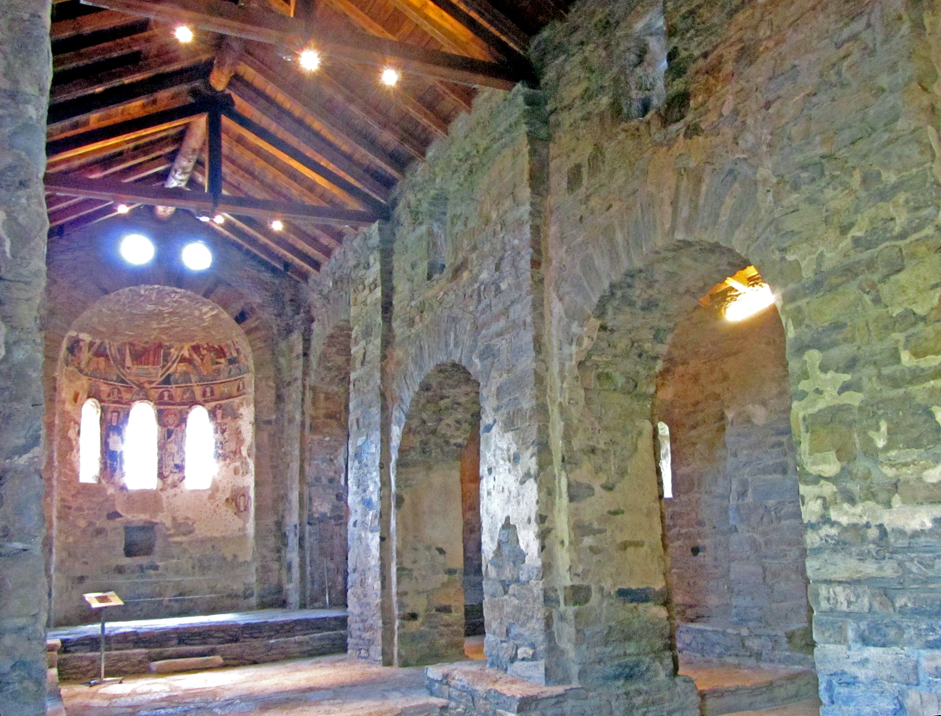 Interior de l'església de Sant Vicenç d'Estamariu Alt Urgell Catalunya Spain